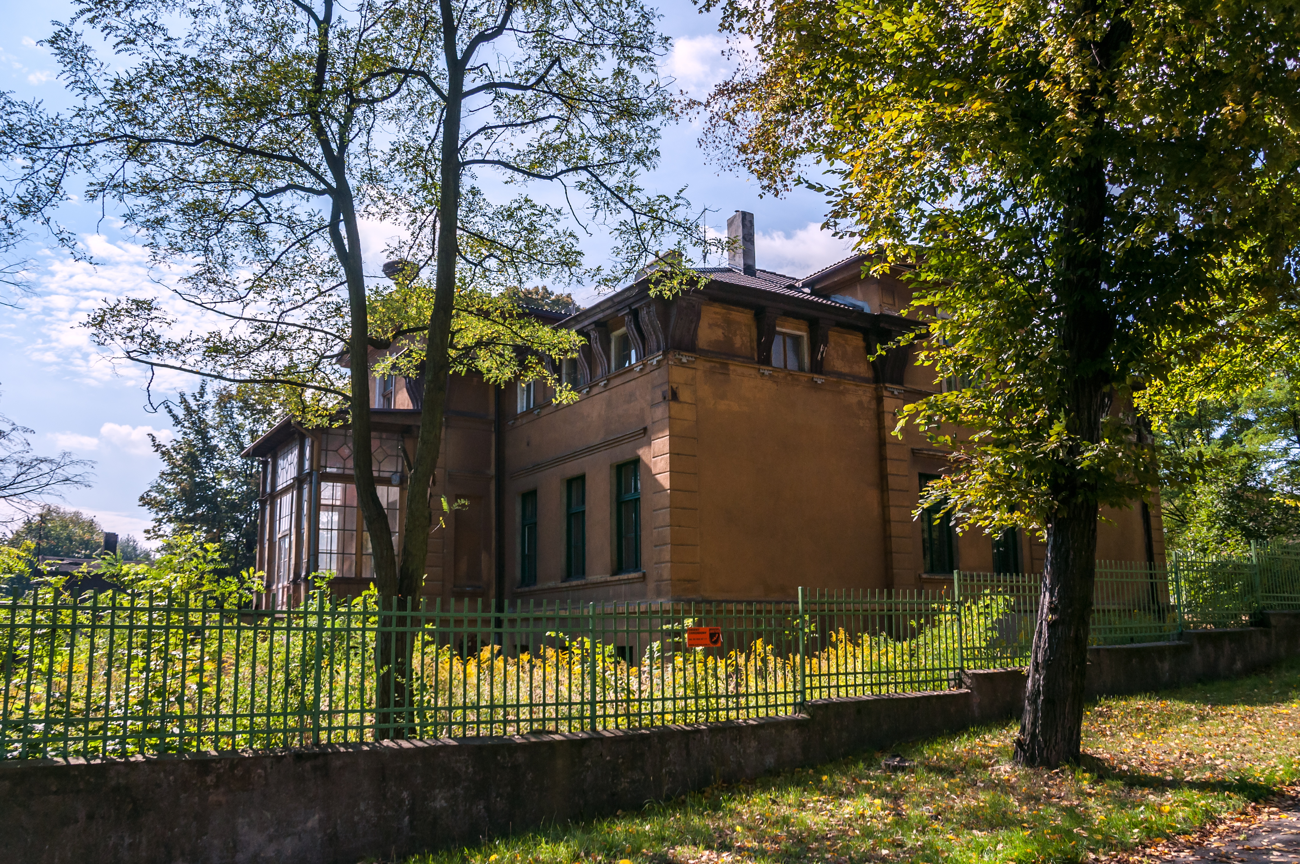 Mysłowice, ul. Powstańców 13. Willa, po 1870.